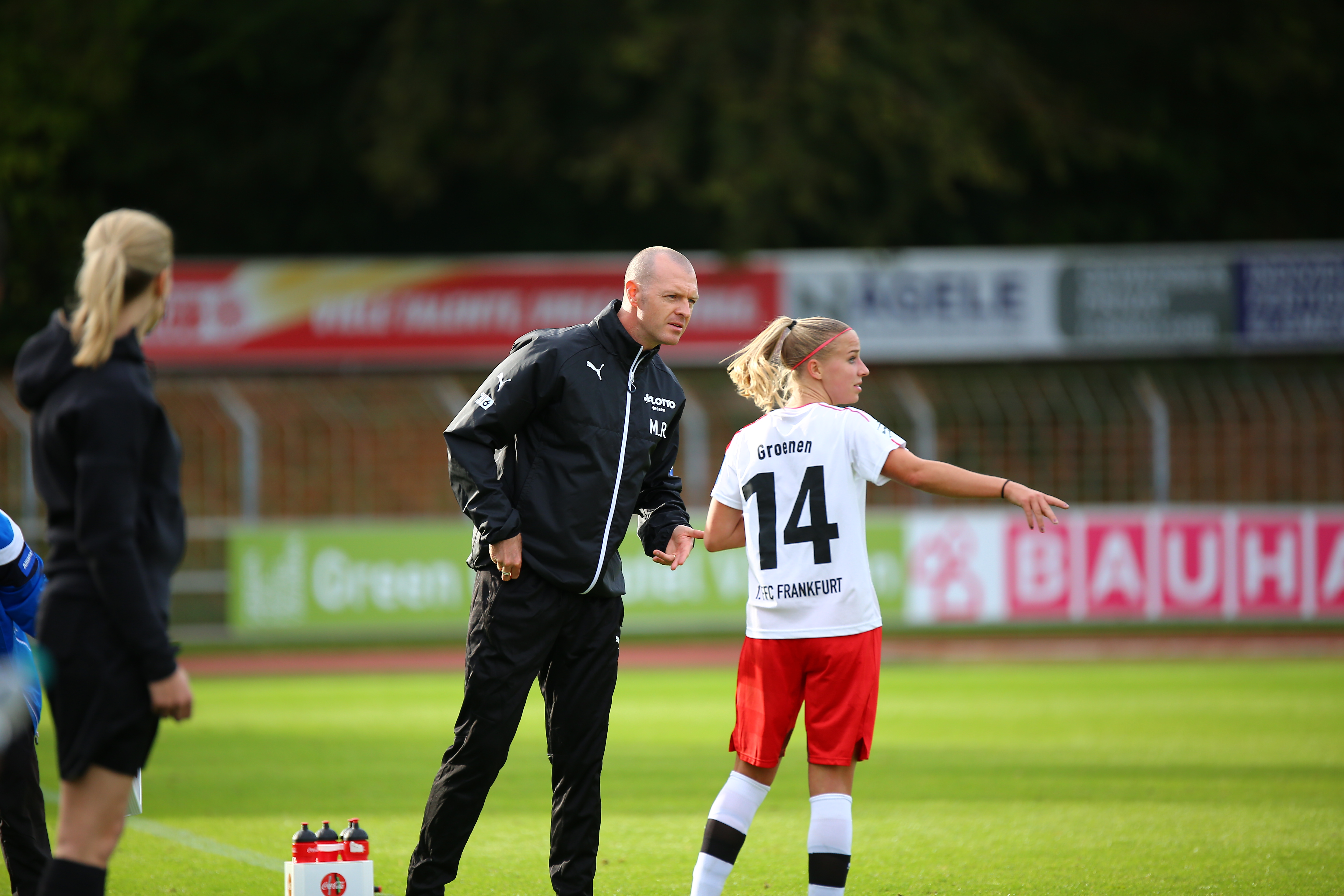 2016-17 Frauen Bundesliga - SC Freiburg v 1. FFC Frankfurt. Matt Ross and Jackie Groenen in discussion.